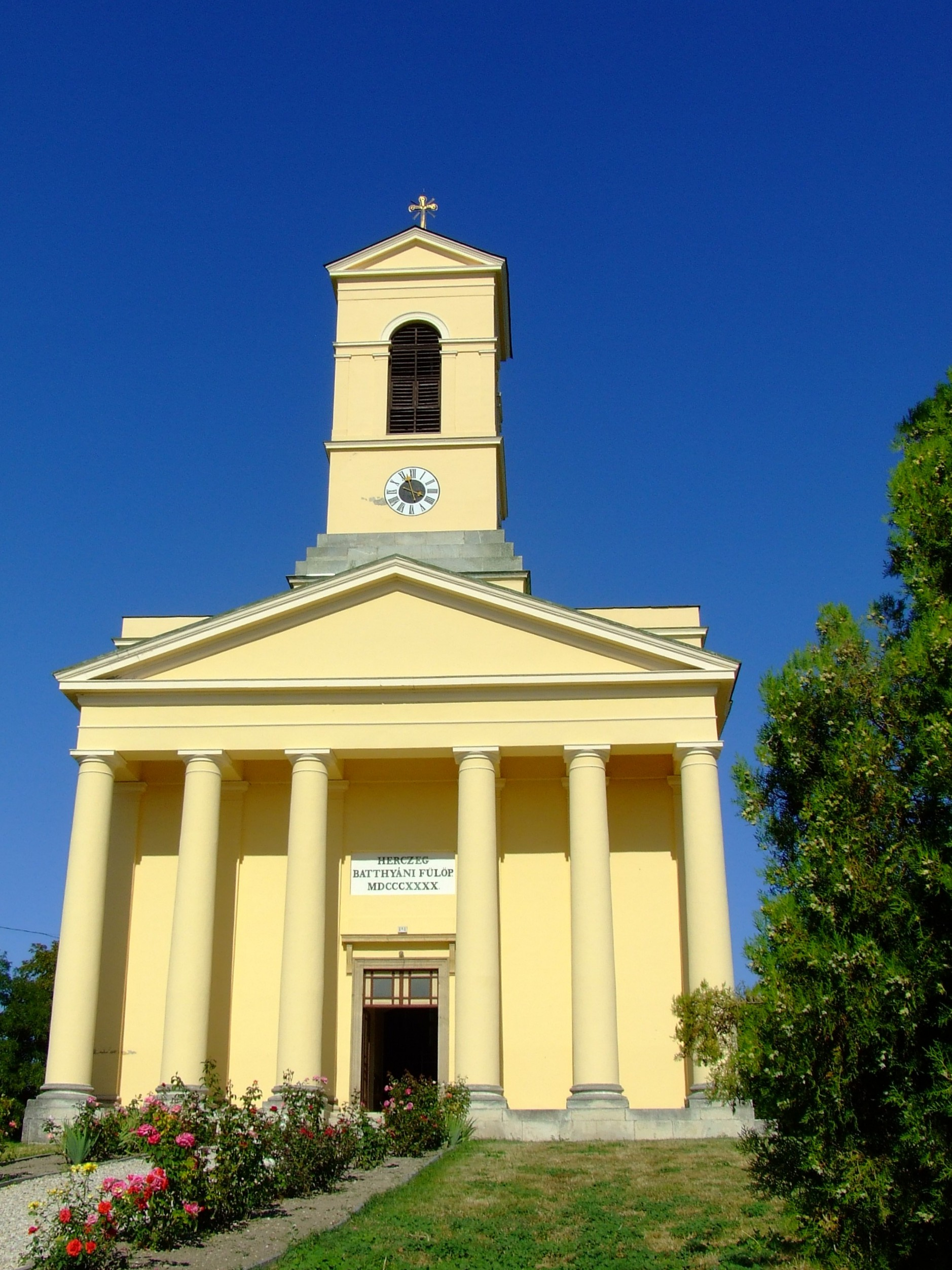 Az enyingi Nepomuki Szent János katolikus templom. Épült klasszicista stílusban 1838 és 1840 között. Építtette: herceg Batthyány Fülöp. tervezte: Pichl Vilmos. Építette: Vojtha Ferenc This is a photo of a monument in Hungary, Identifier: 3616